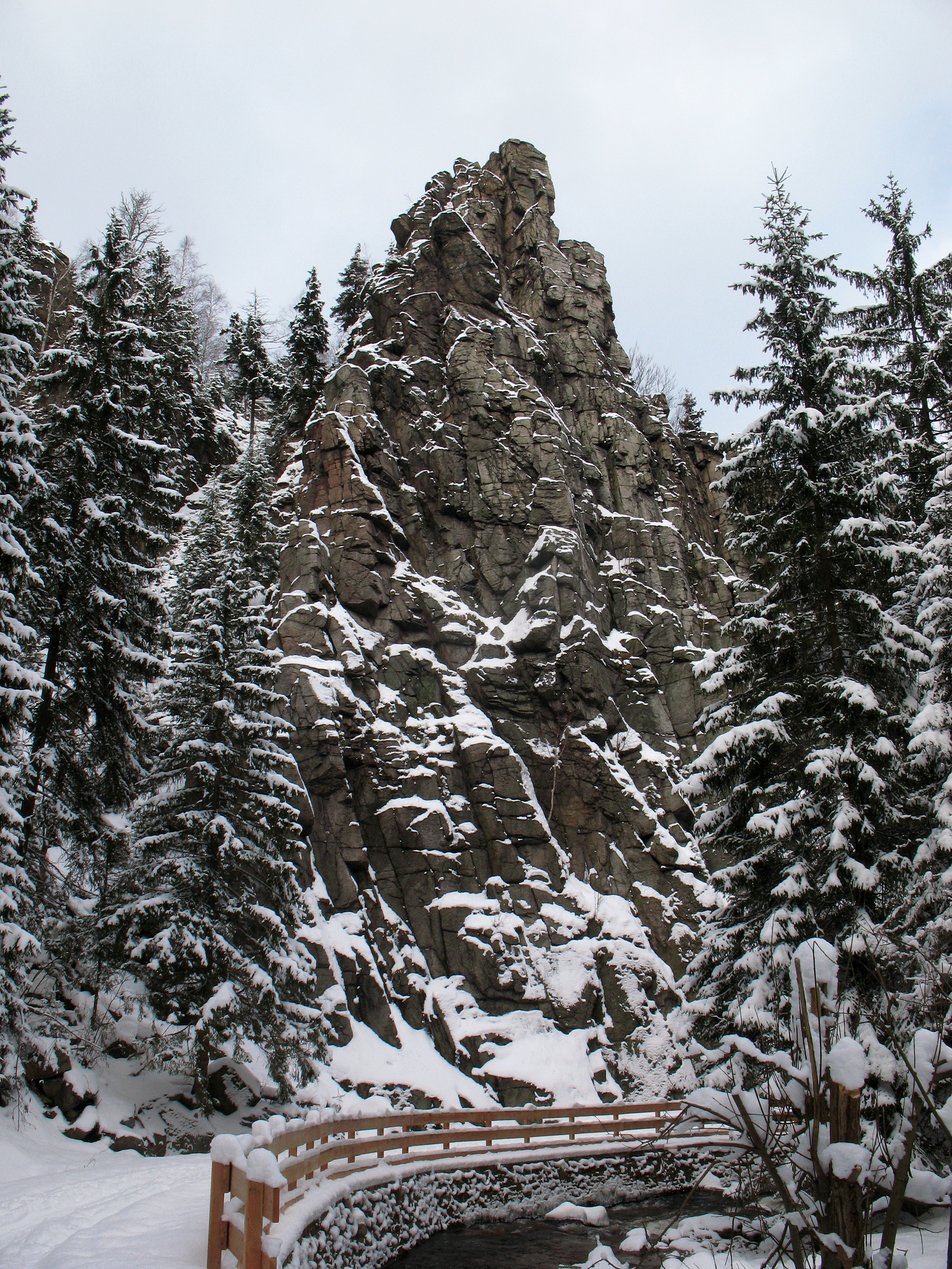 Schwarzwassertal zwischen Kühnhaide und Pobershau im Winter